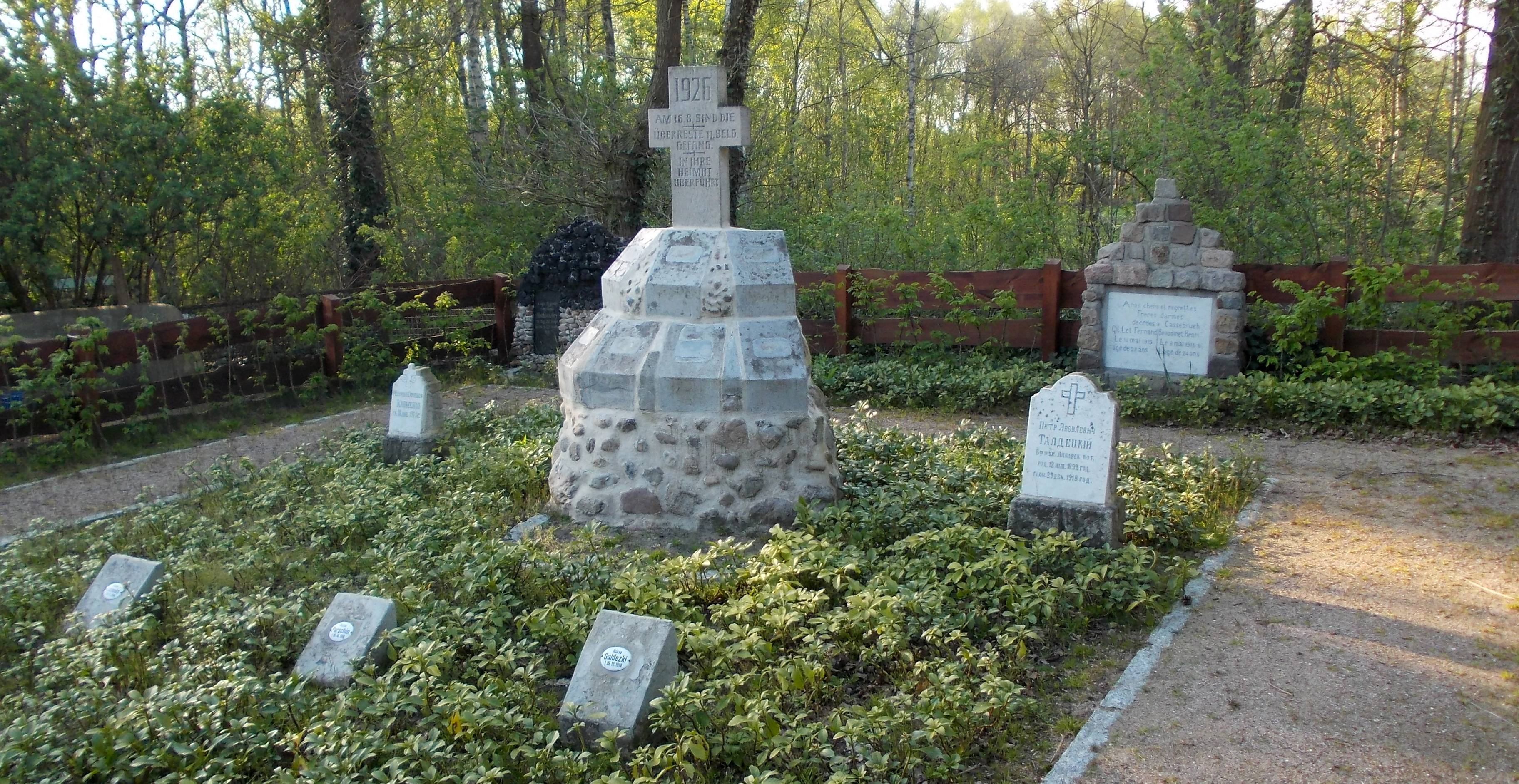 Foto von der Gedenkstätte zu einem Kriegsgefangenenlager in Kassebruch /Hagen im Bremischen